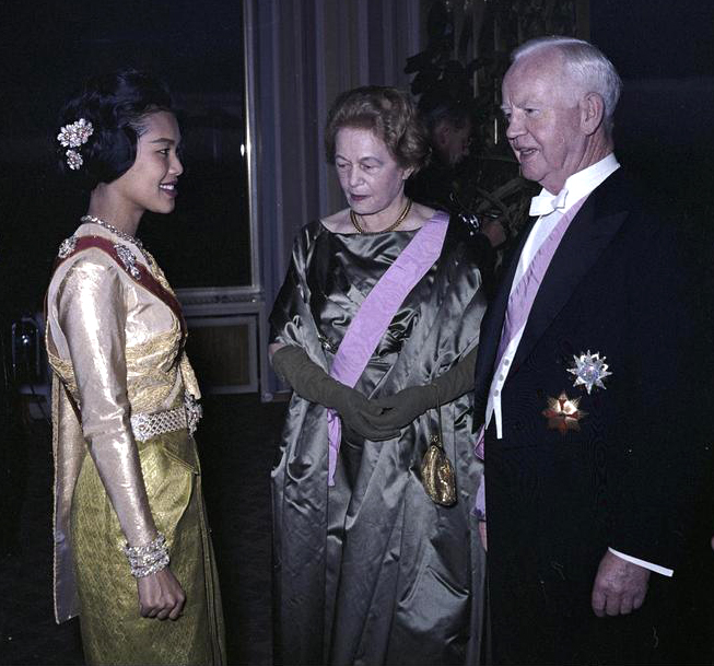 Petersberg, Staatsempfang für König von Thailand Empfang für das thailändische Königspaar auf dem Petersberg [Bundespräsident Heinrich Lübke und Gattin Wilhelmine mit der Königin von Thailand, Sirikit] Abgebildete Personen: Lübke, Heinrich: Bundespräsident, Bundesminister für Ernährung, Landwirtschaft und Forsten, CDU, Bundesrepublik Deutschland Lübke, Wilhelmine: Gattin des Bundespräsidenten Heinrich Lübke, Bundesrepublik Deutschland# (GND 118809253) Somdet Phra Nangchao Sirikit Phra Boromarachininat: Königin Sirikit von Thailand